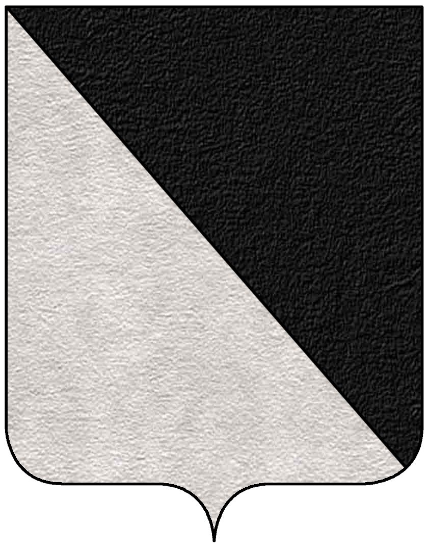 Stemma della famiglia Caponi